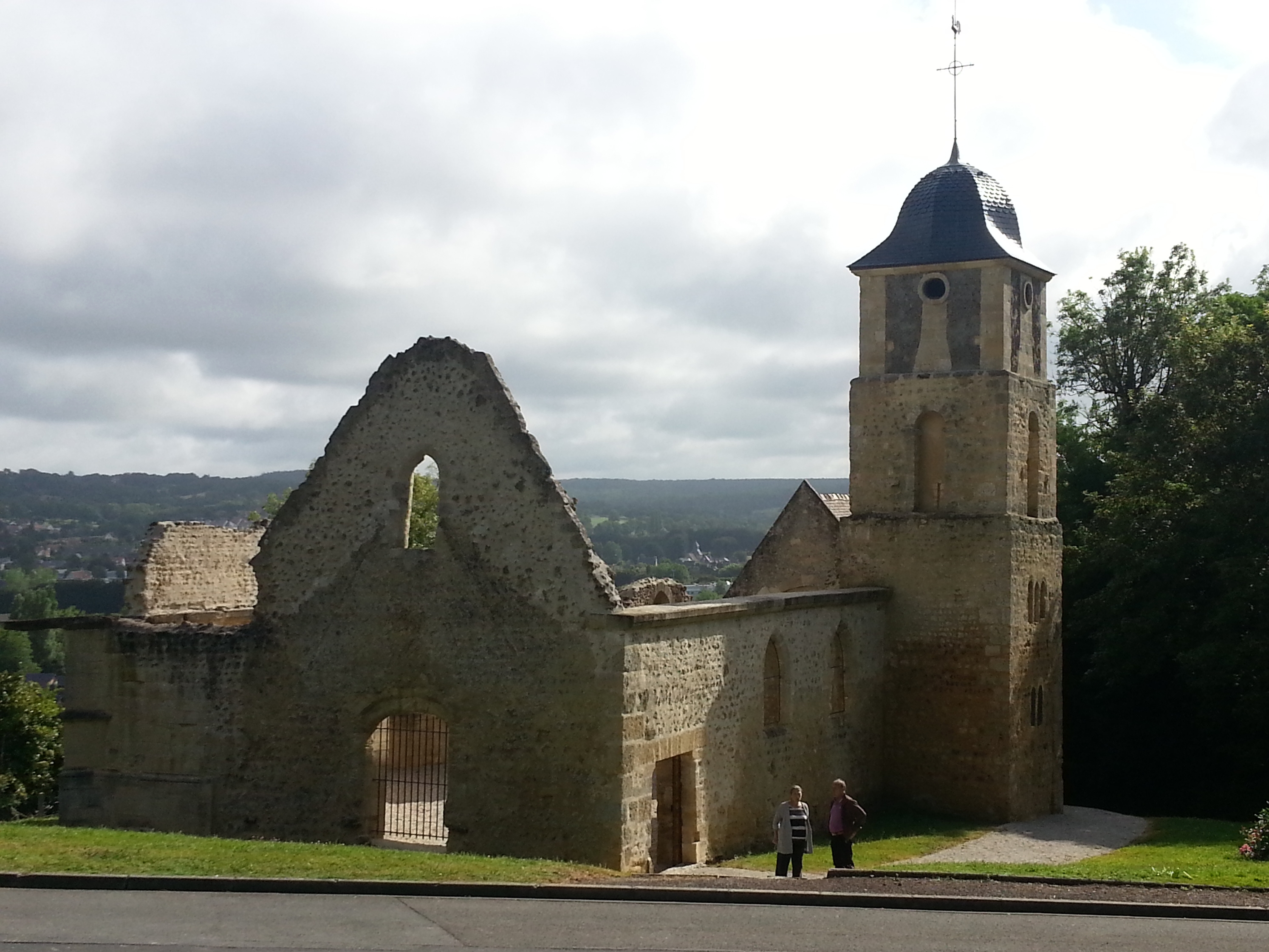 Prieuré de Saint-Arnoult .